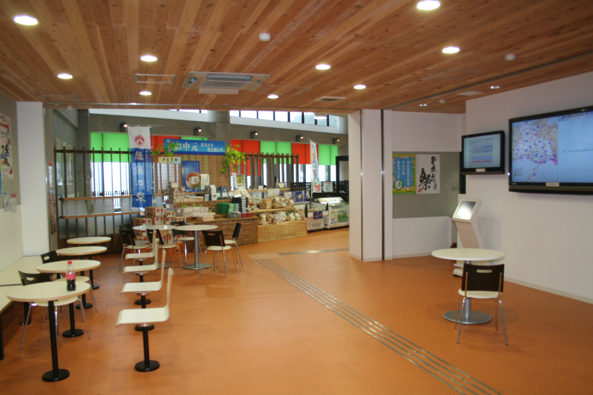 道の駅みつ。兵庫県たつの市御津町にある道の駅。国道250号線の七曲りと呼ばれる区域の側にある。 道の駅の内部。中には交通情報を閲覧できる休憩所と土産物屋などがある。